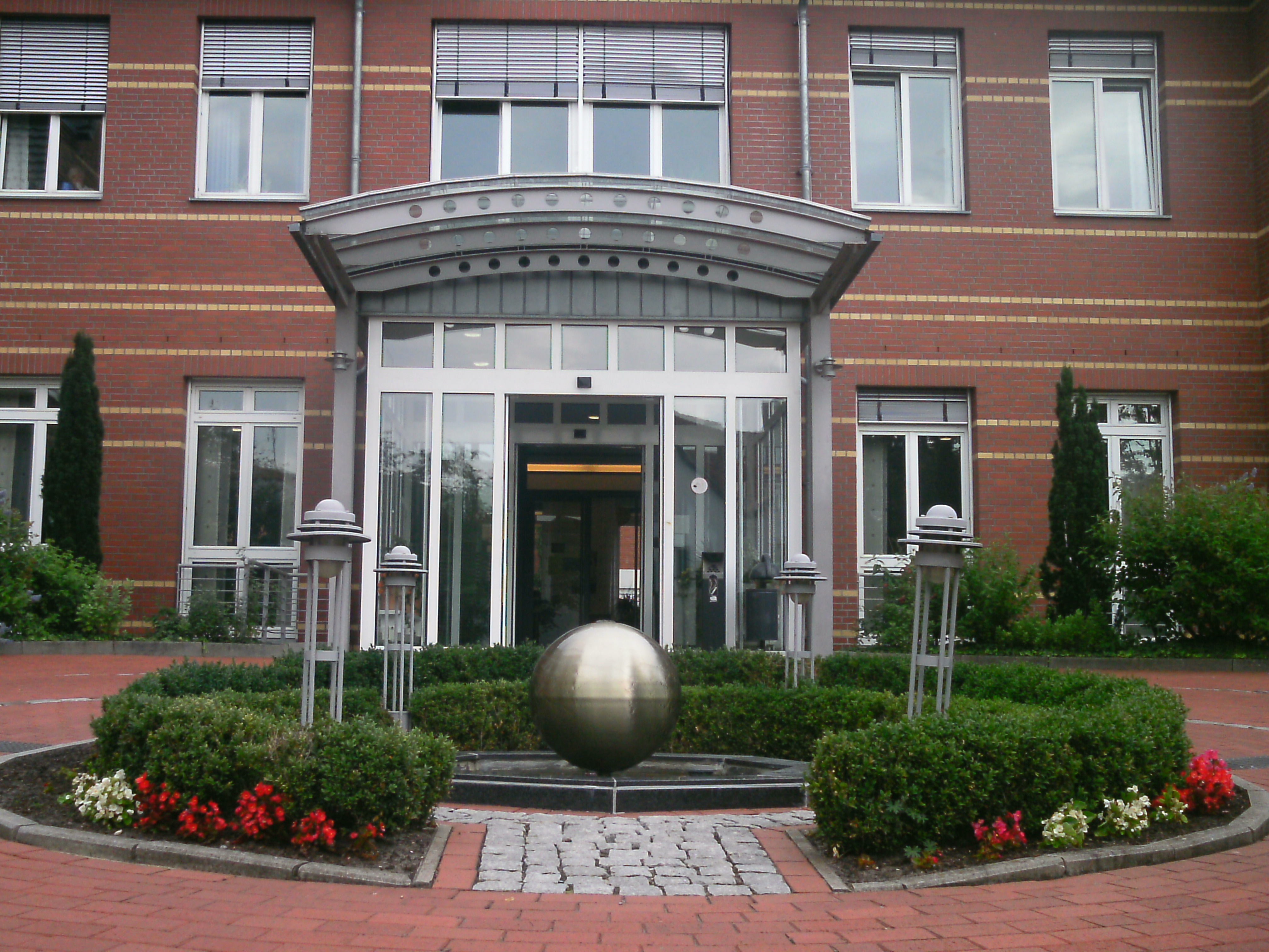 Eingang der Klinik in Twistringen